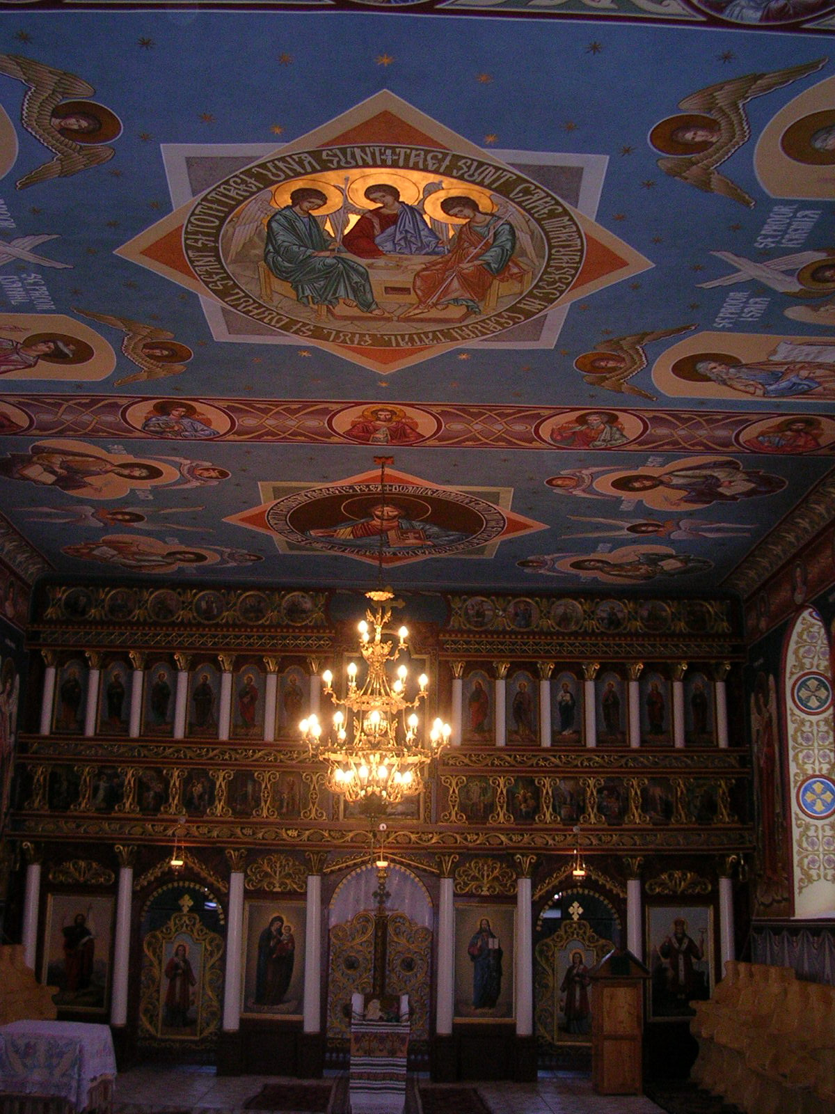 Biserica Sf Cosma si Damian - interior 2005 (foto Oblio)